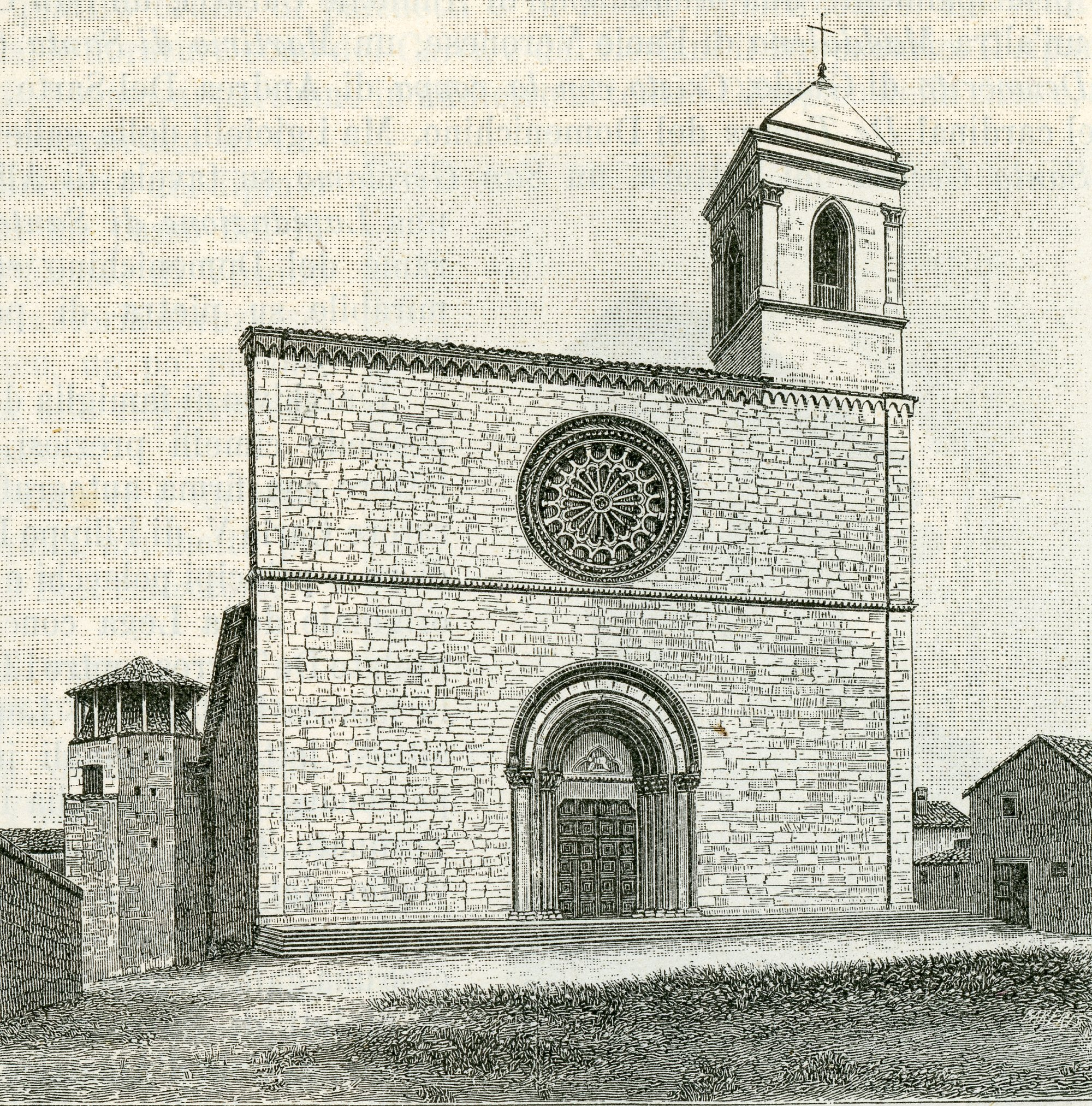 Aquila: chiesa di San Silvestro (incisore anonimo 1899).